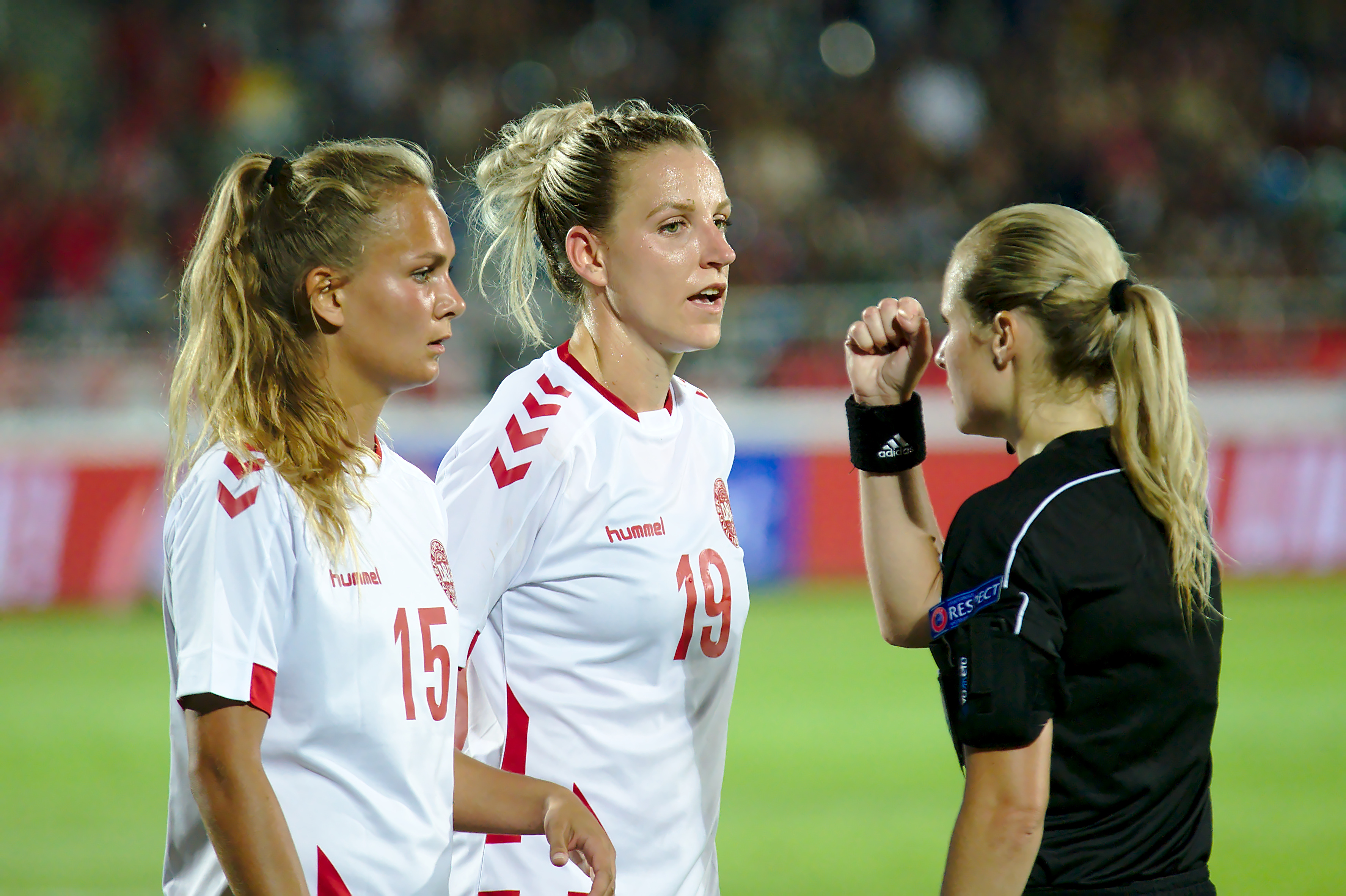 Freundschaftsspiel ÖFB Damen Nationalmannschaft gegen Dänemark am 6. Juli 2017. Bild zeigt: Frederikke Thøgersen (DEN, 15), Cecilie Sandvej (DEN, 19)